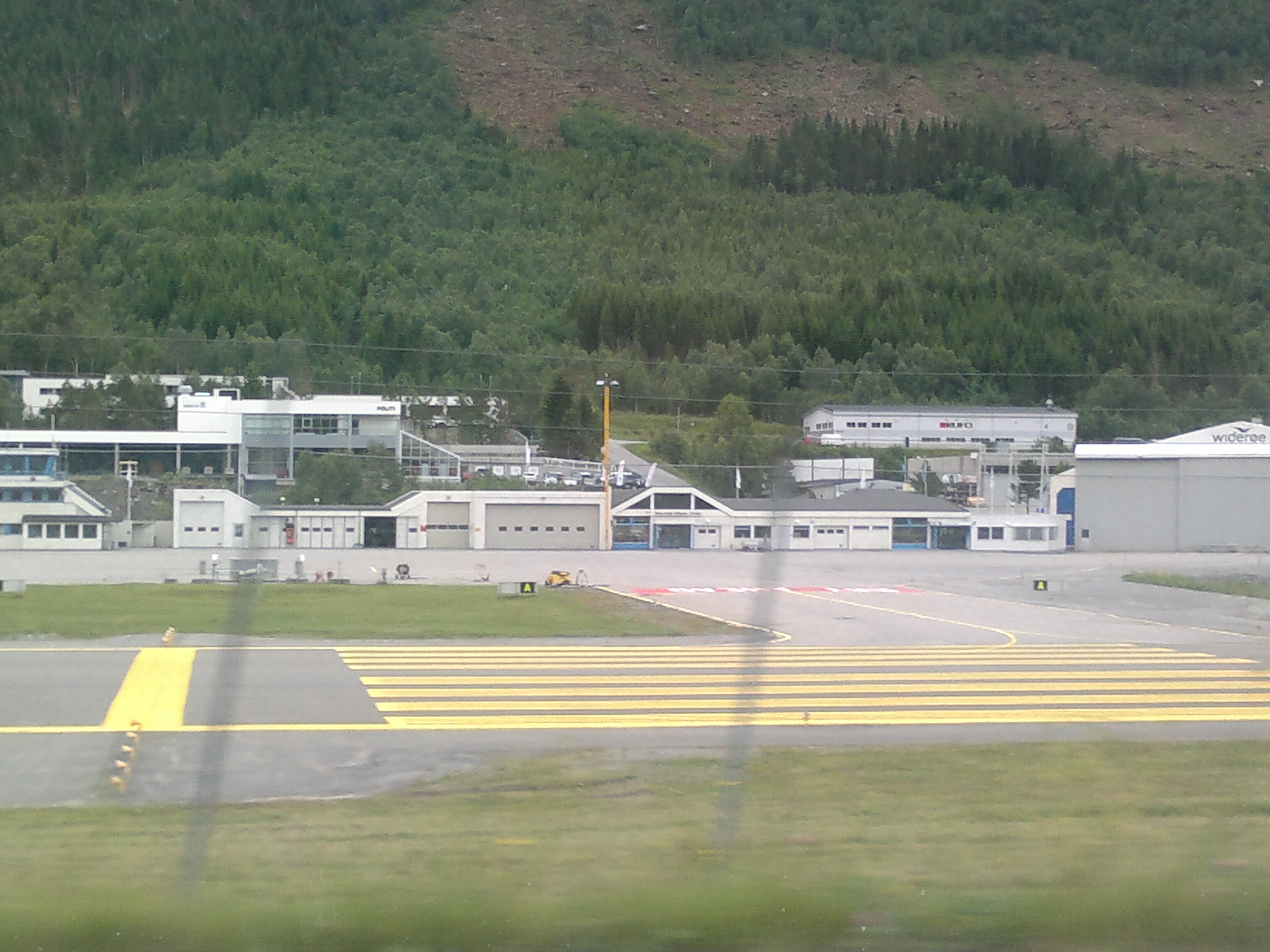 Ørsta-Voldan lentoasema Ørstan kunnassa, Norjassa.